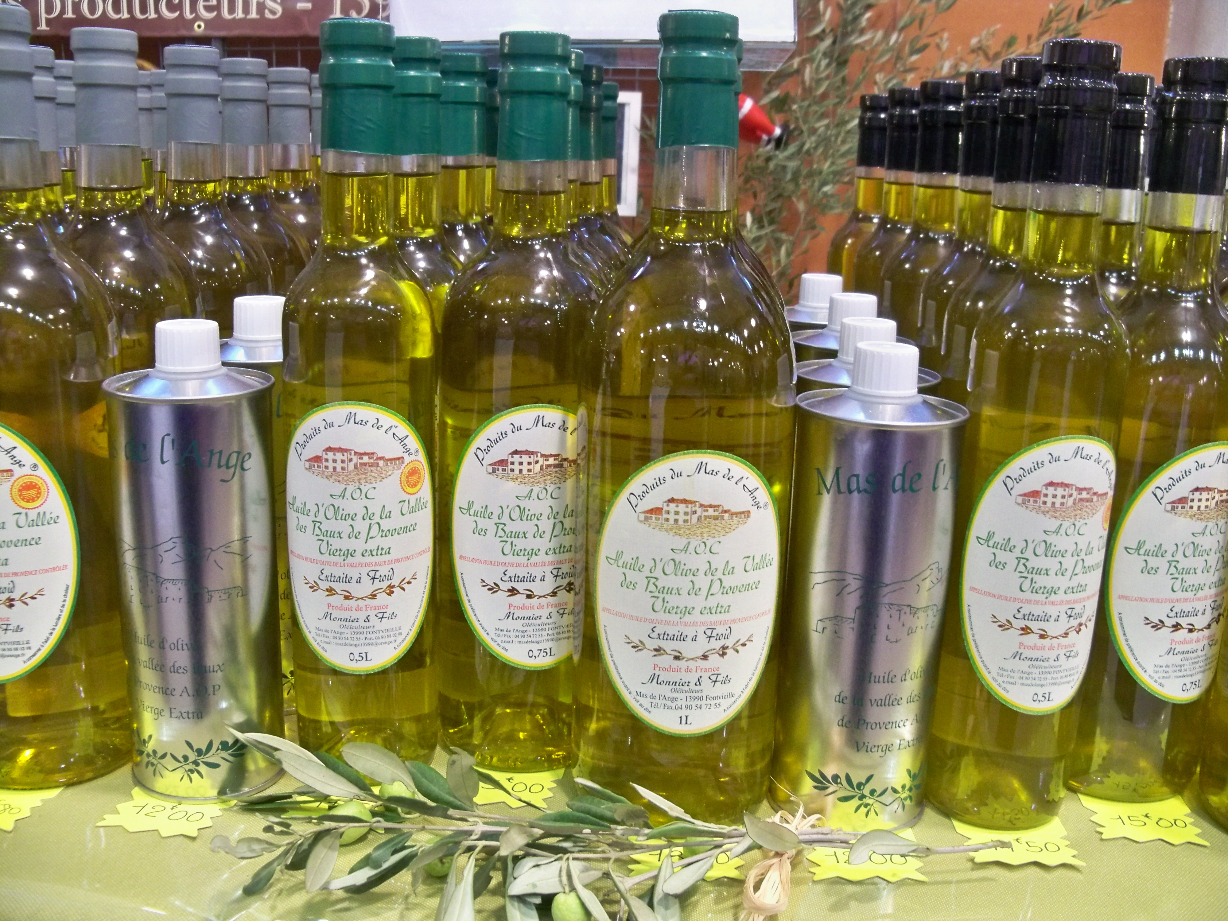 huile d'olives des Beaux de Provence